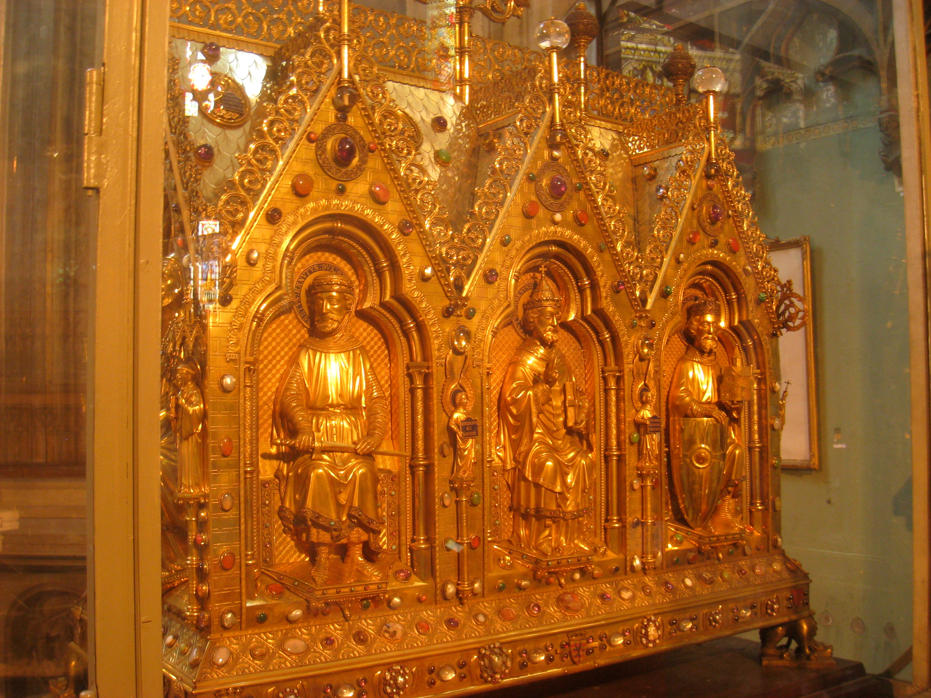 Sint-Salvatorskathedraal in Bruges (Brugge), Belgium.